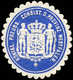 Sealing stamp Title: Königlich Preussisches Consistorium der Provinz Westfalen Description: blau, weiß, geprägt, Kirche Place: Münster size: 4x3 cm